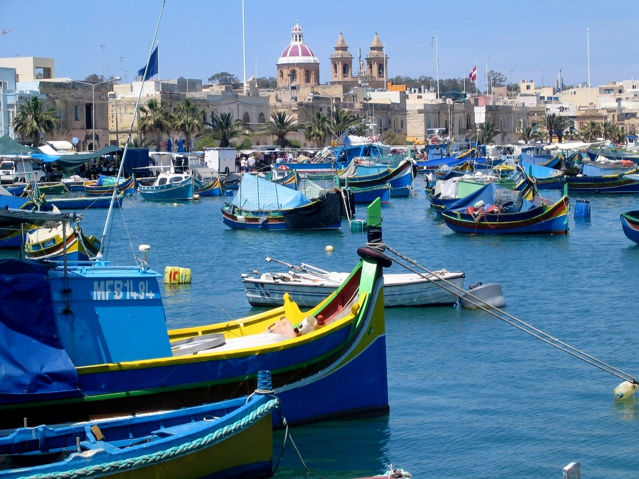 Malte Marsaxlokk Port 10052009